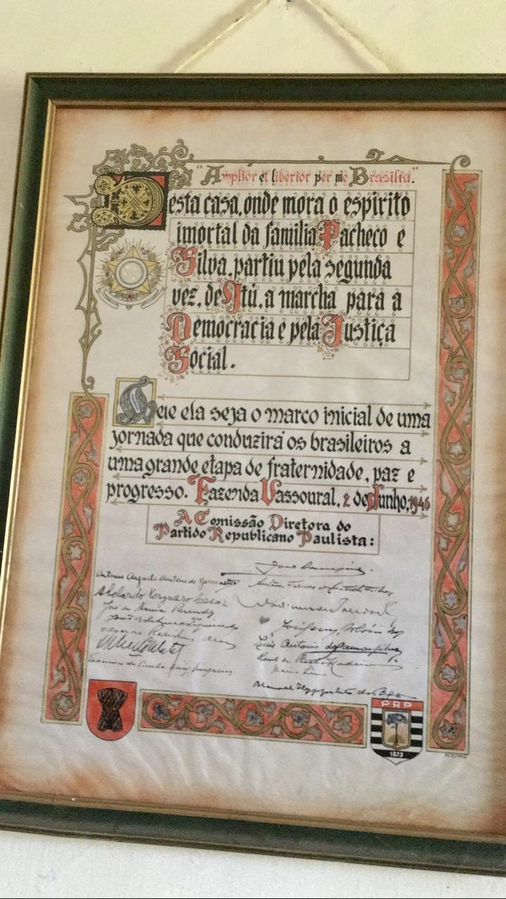 Este documento encontra-se preservado historicamente na Fazenda Vassoural em Itu _ São Paulo.